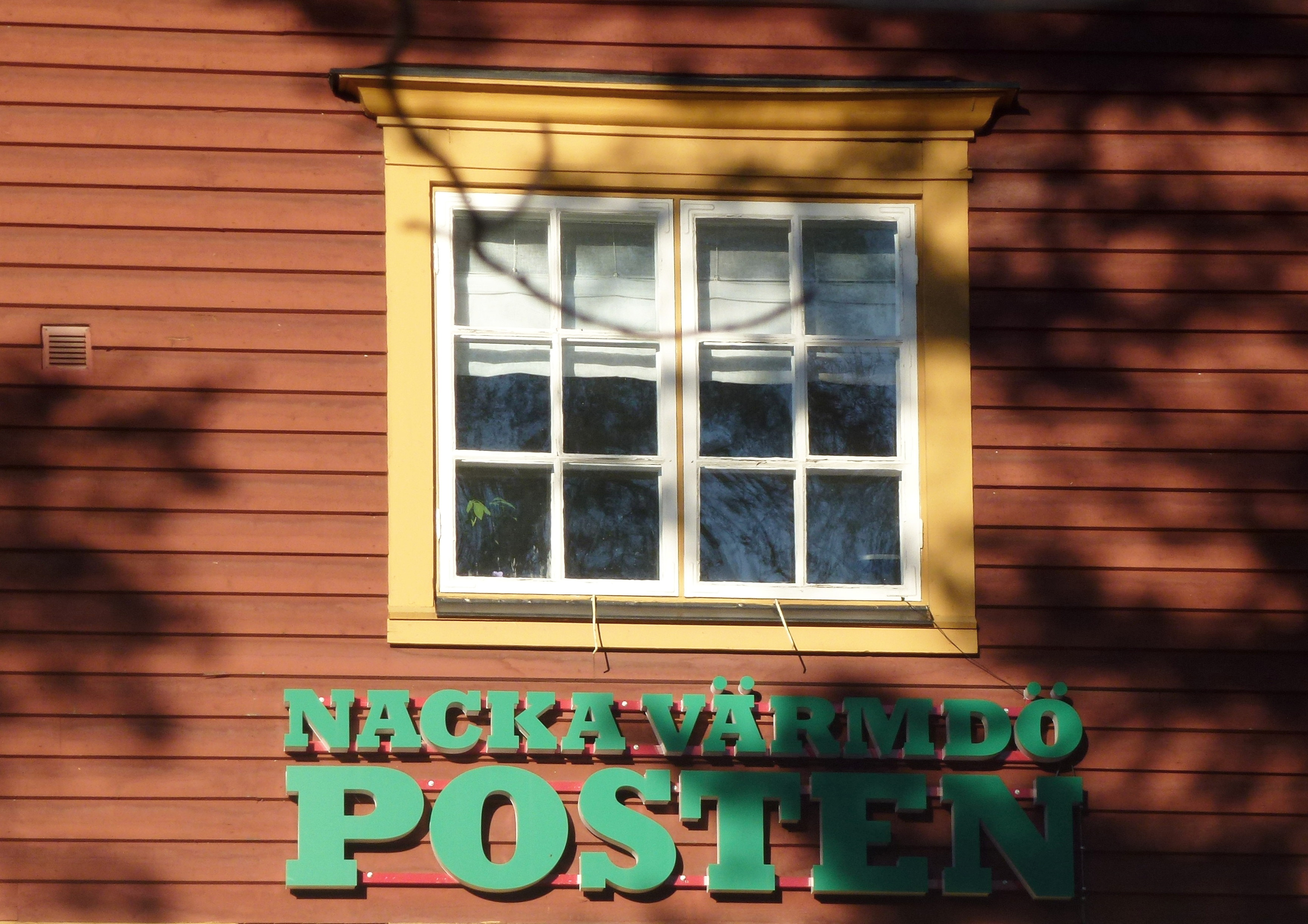 Villa Pauli, Storängen, arkitekt Albin Brag